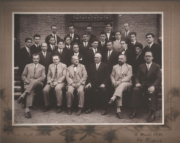 Вторият випуск лесовъди пред Агрономо-лесовъдния факултет (сега Биологически факултет), юни 1930 година. Преподавателите: седнали отляво надясно: Васил Стоянов (лесоползване), Борис Стефанов (дендрология, анатомия на дървото, горска фитоценология), Тодор Димитров (частно лесовъдство (горски култури)), Темелко Иванчев (горска таксация, лесоустройство), Тома Захариев (общо лесовъдство), Методи Русков (общо лесовъдство).